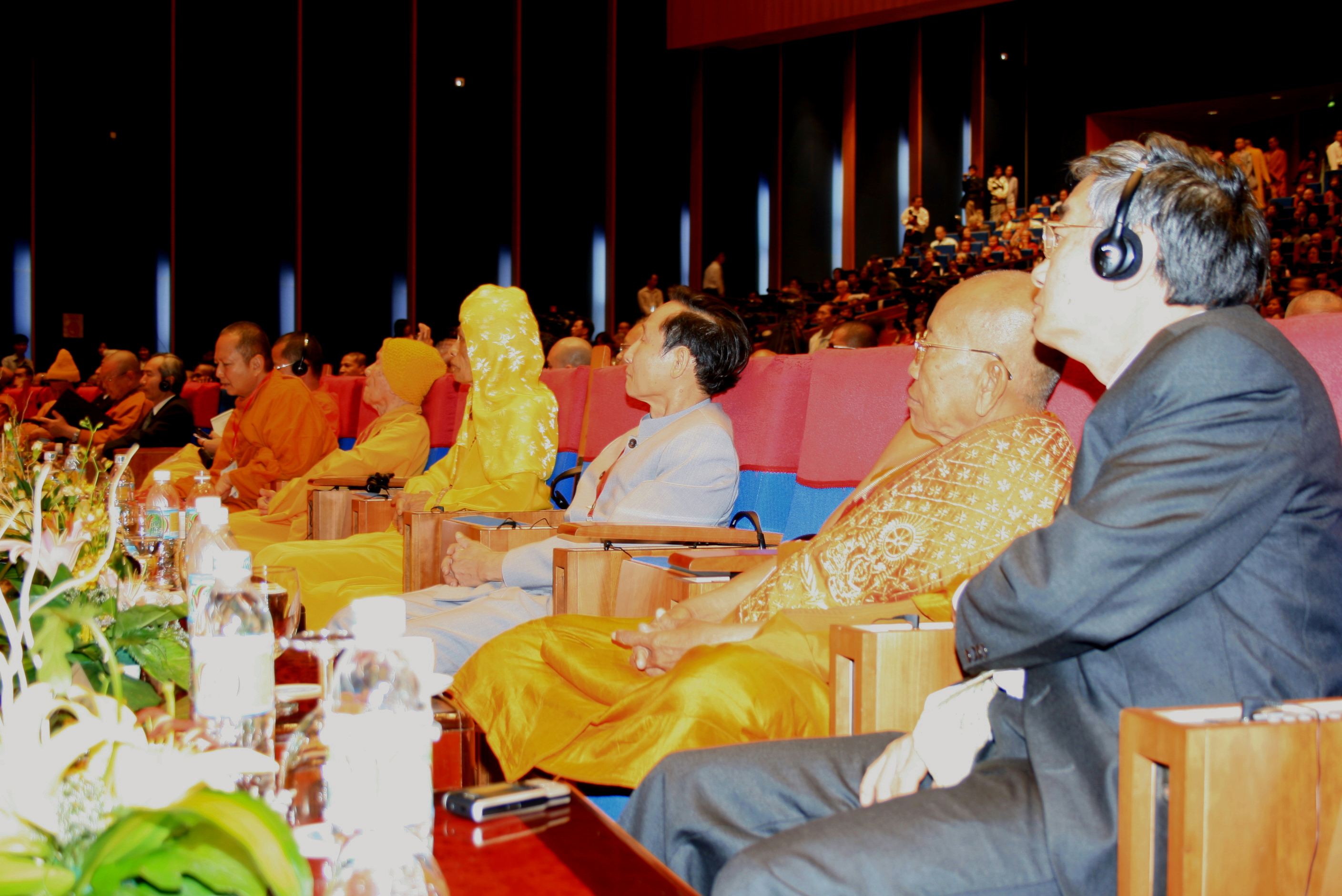 Giáo sư, tiến sĩ Lê Mạnh Thát (người thứ 3, bên phải sang) tại Đại lễ Phật đản Liên hợp quốc 2008